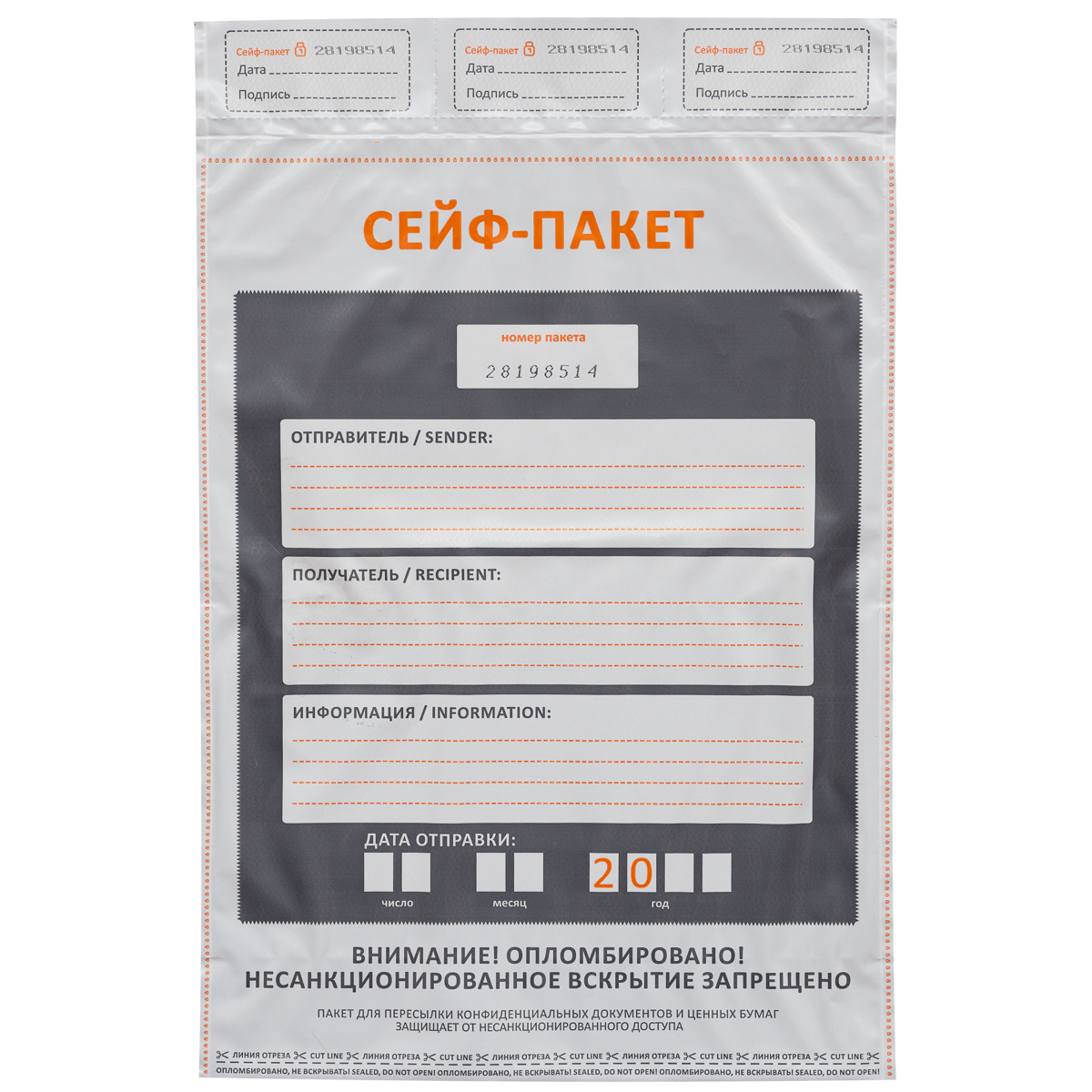 Лицевая сторона сейф-пакета с полями для заполнения данных об отправителе, получателе, дате отправки а также дополнительной информации.